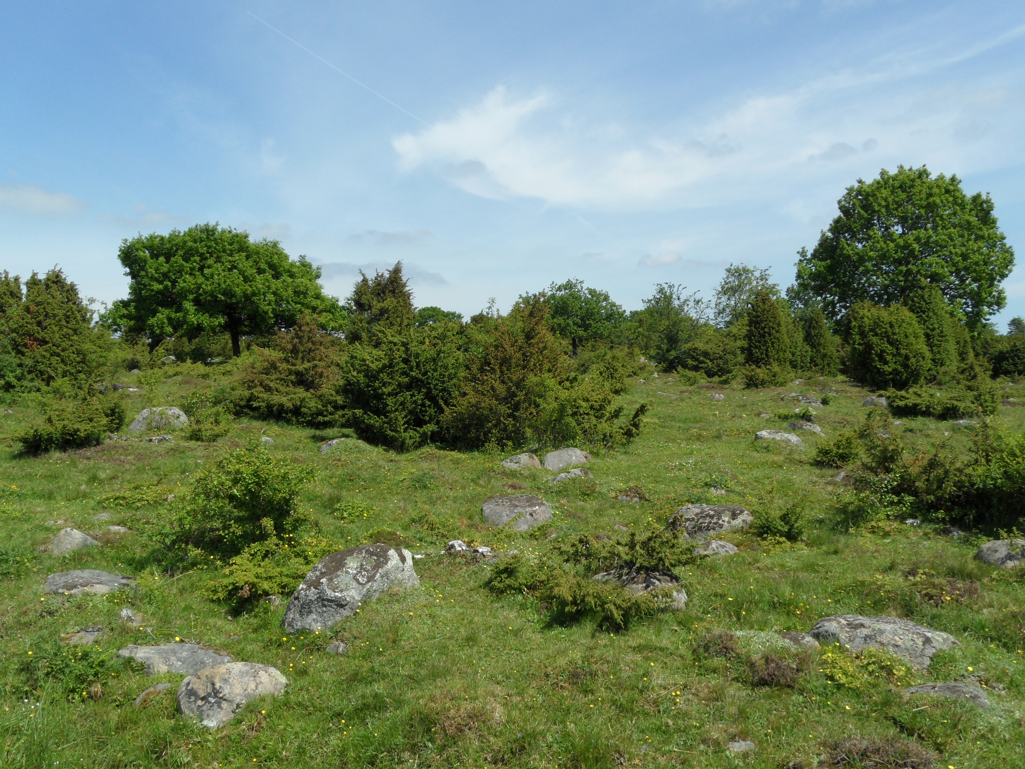 Sniberups fälad enefälad